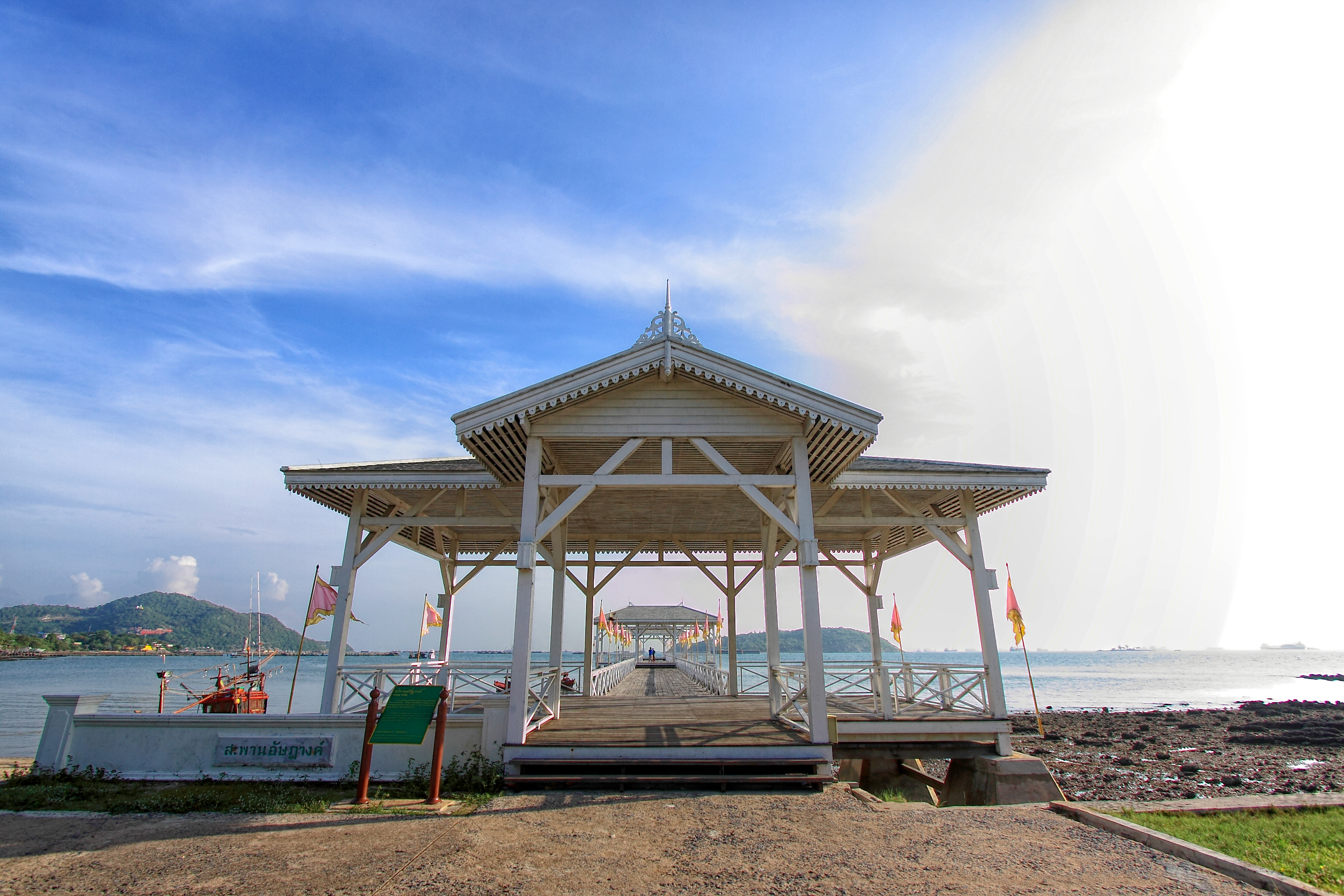 พระจุฑาธุชราชฐาน ตั้งอยู่ ณ เกาะสีชัง จังหวัดชลบุรี อดีตเคยเป็นพระราชวังฤดูร้อนในพระบาทสมเด็จพระจุลจอมเกล้าเจ้าอยู่หัว หลังจากเหตุการณ์วิกฤต ร.ศ.112 ก็สิ้นสุดการเป็นเขตพระราชฐาน และมีหน่วยงานราชการต่าง ๆ มาขอใช้พื้นที่ ปัจจุบัน จุฬาลงกรณ์มหาวิทยาลัยขอใช้พื้นที่บางส่วนเพื่อเป็นสถานีวิจัยวิทยาศาสตร์ทางทะเลและศูนย์ฝึกนิสิต และทำหน้าที่ดูแลรักษาพระจุฑาธุชราชฐานไปในคราวเดียวกัน